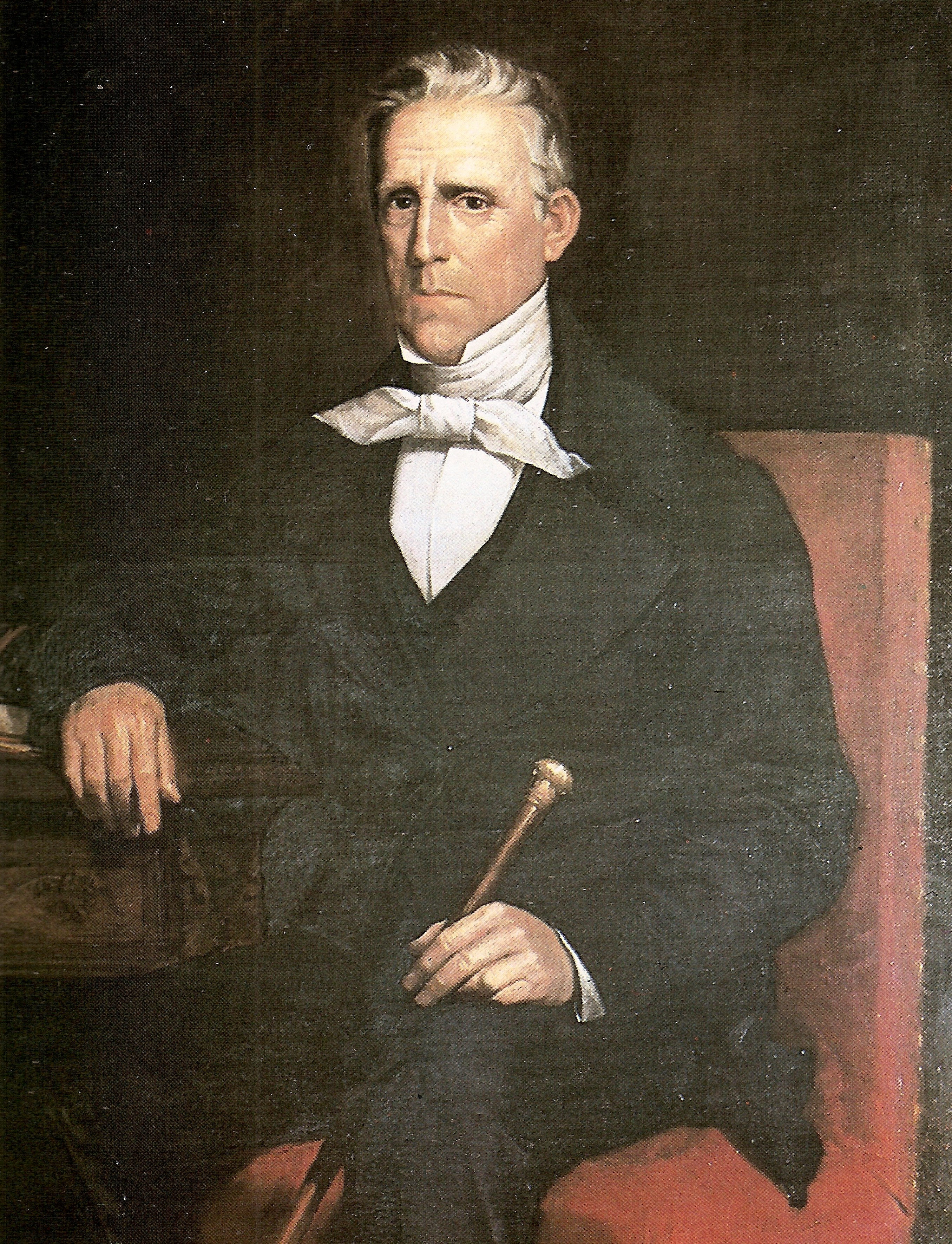 Martín Tovar y Tovar: Retrato de Andrés Narvarte (1874) oleo/tela. colección del Ministerio del Poder Popular para las Relaciones Exteriores. Caracas - Venezuela